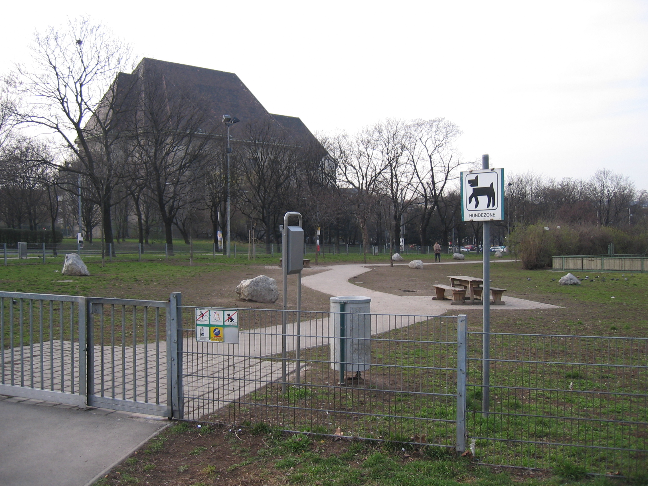 Hundezone am Margaretengürtel - Wien